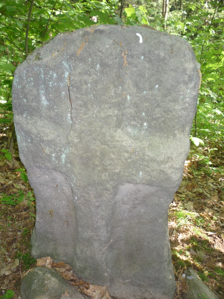 Krzyż na wzgórzu Skałka w Płakowicach (Lwówek Sląski)